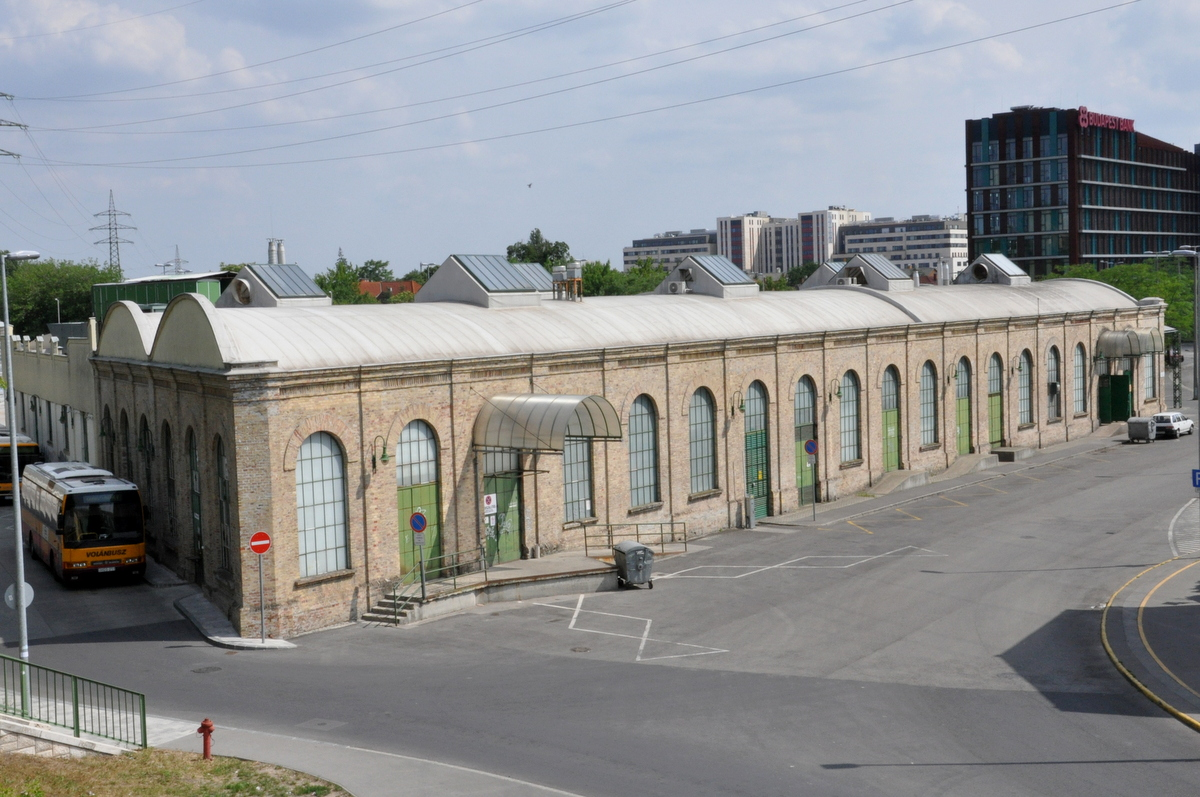 Historical tram depo (now supermarket), Újpest városkapu, Budapest